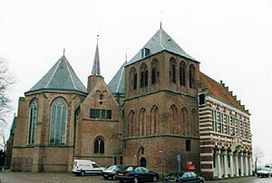 Grote kerk Vollenhove